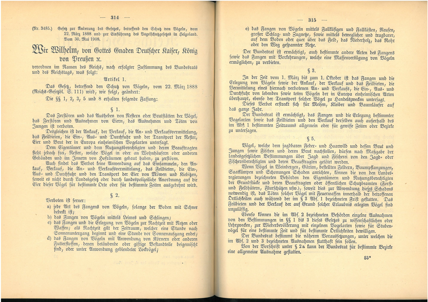 Text des Vogelschutzänderungsgesetzes mit Neubekanntmachung 1908